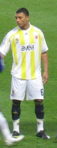 Chelsea 2-0 Fenerbahçe